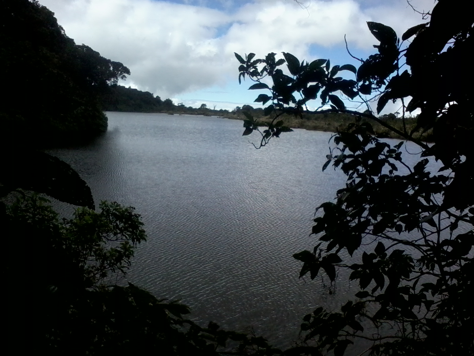 Panoramica laguna del sielncio